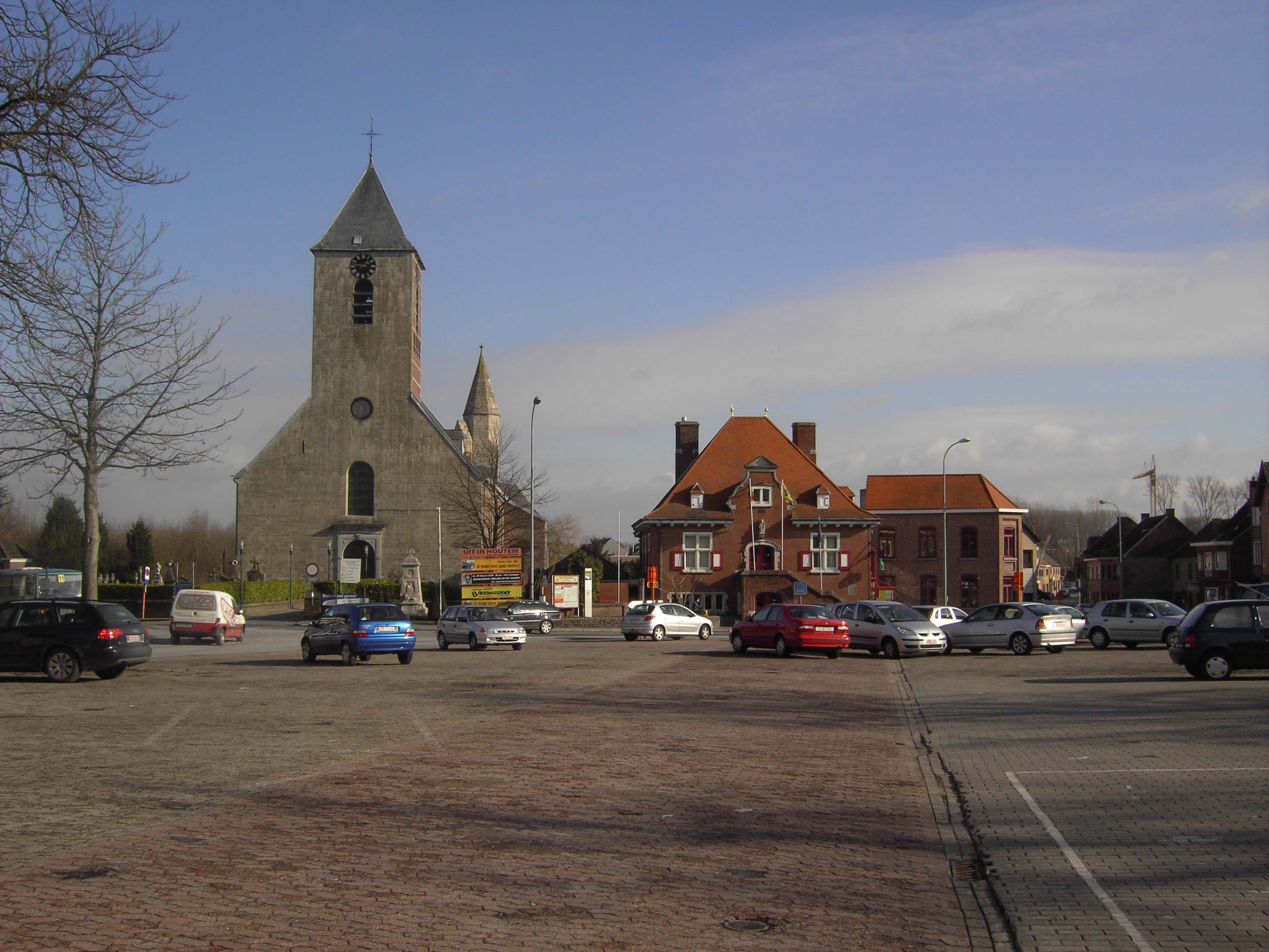 Kerk en gemeentehuis van Sint-Lievens-Houtem - Oost-Vlaanderen - Vlaanderen - België